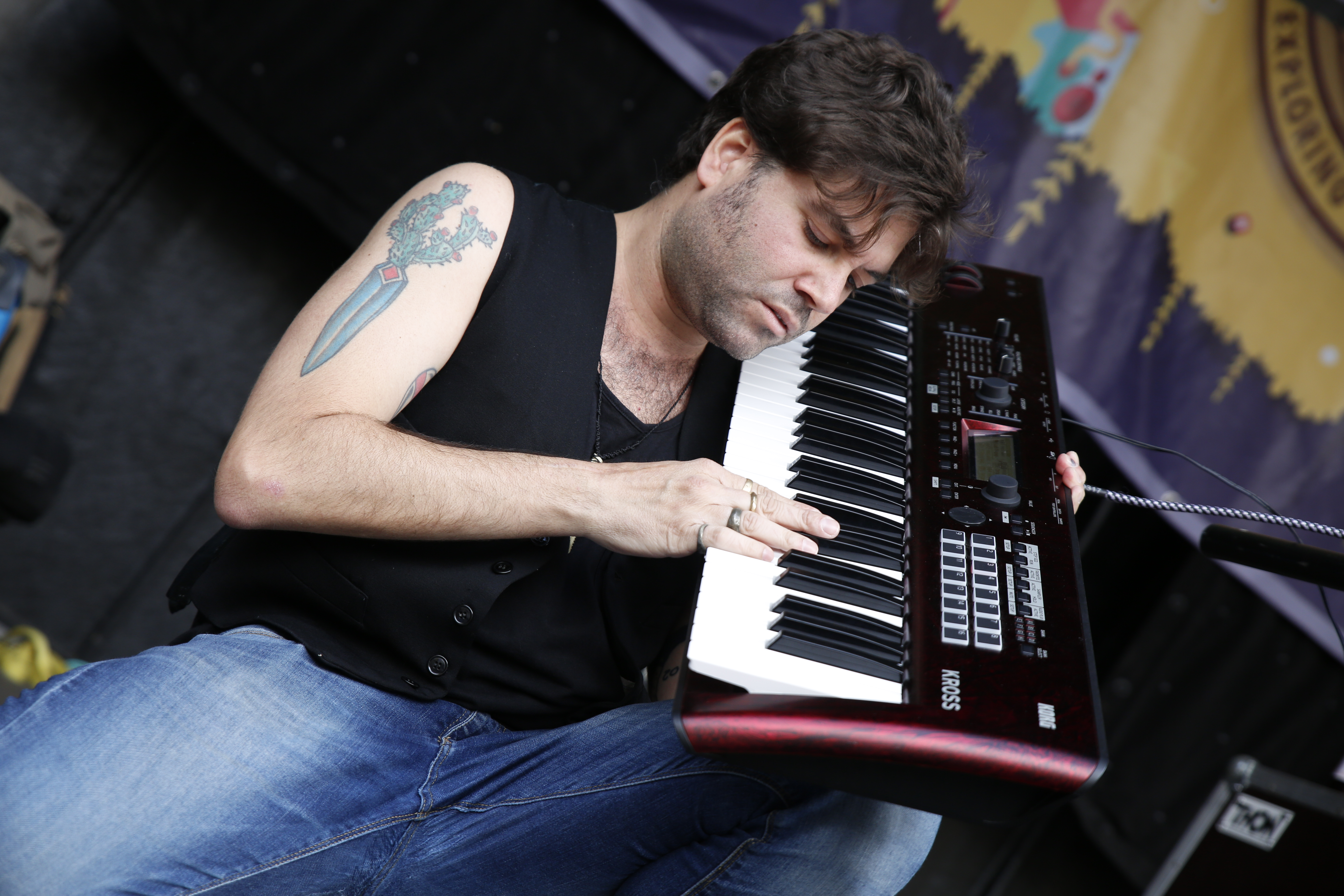 Actuación de Joe Crepúsculo en el festival Palencia Sonora 2018.